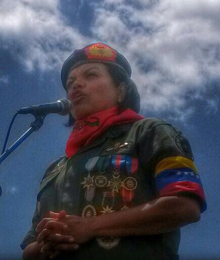 Almiranta Maribel Parra de Mestre